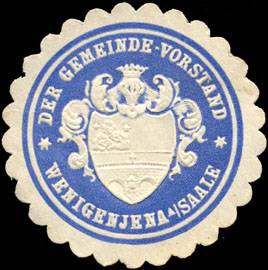 Sealing stamp Title: Der Gemeinde - Vorstand Wenigenjena an der Saale Description: geprägt, blau, weiss Place: Wenigenjena size: 4 cm